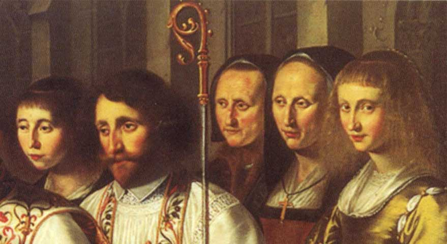 Bernardus van Clairvaux bekeert Willem van Aquitanië (detail: vier klopjes op de achtergrond)